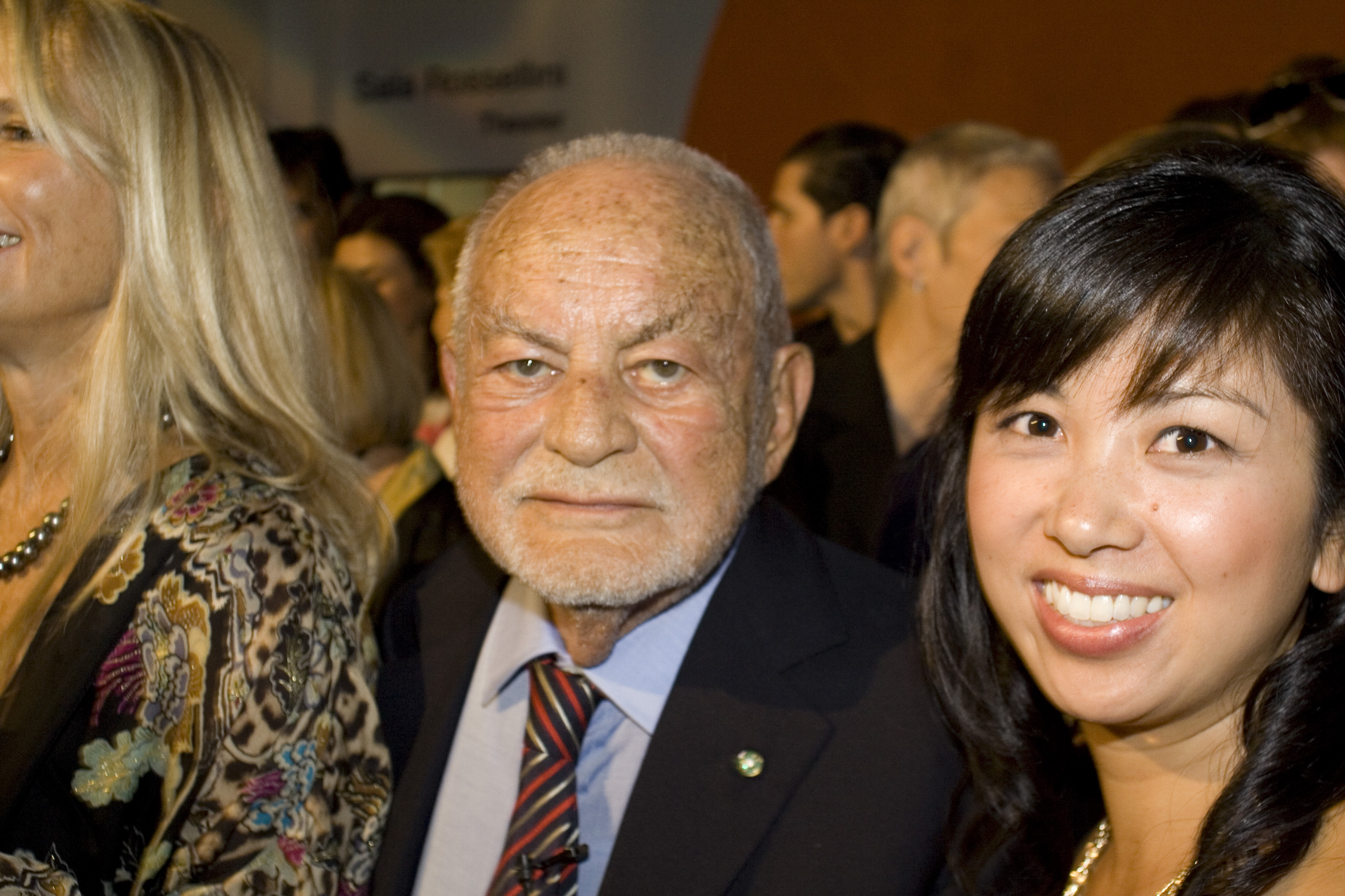 IIC Tribute to Dino DeLaurentiis